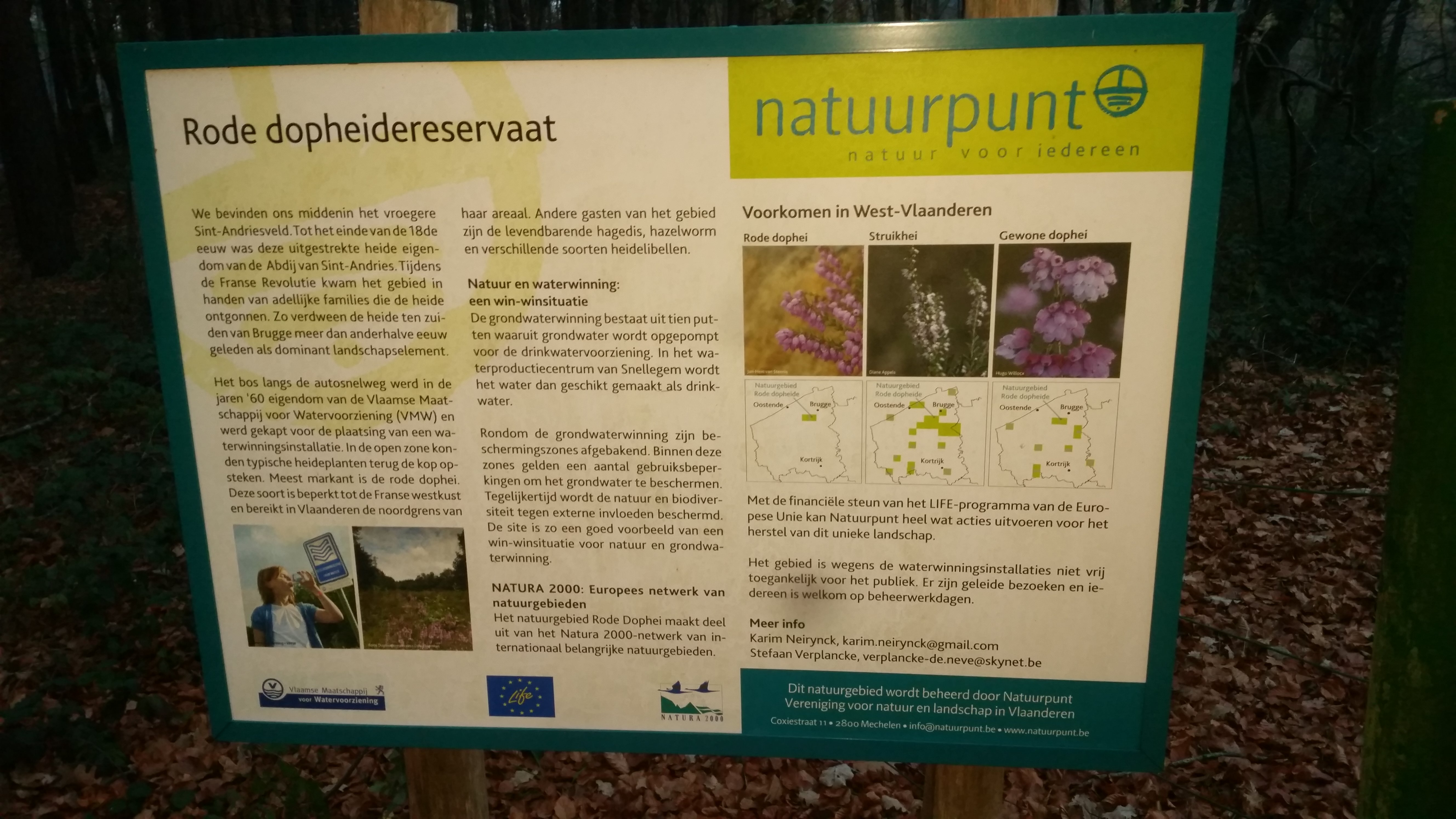 Infobord dat staat bij het Rode Dopheidereservaat